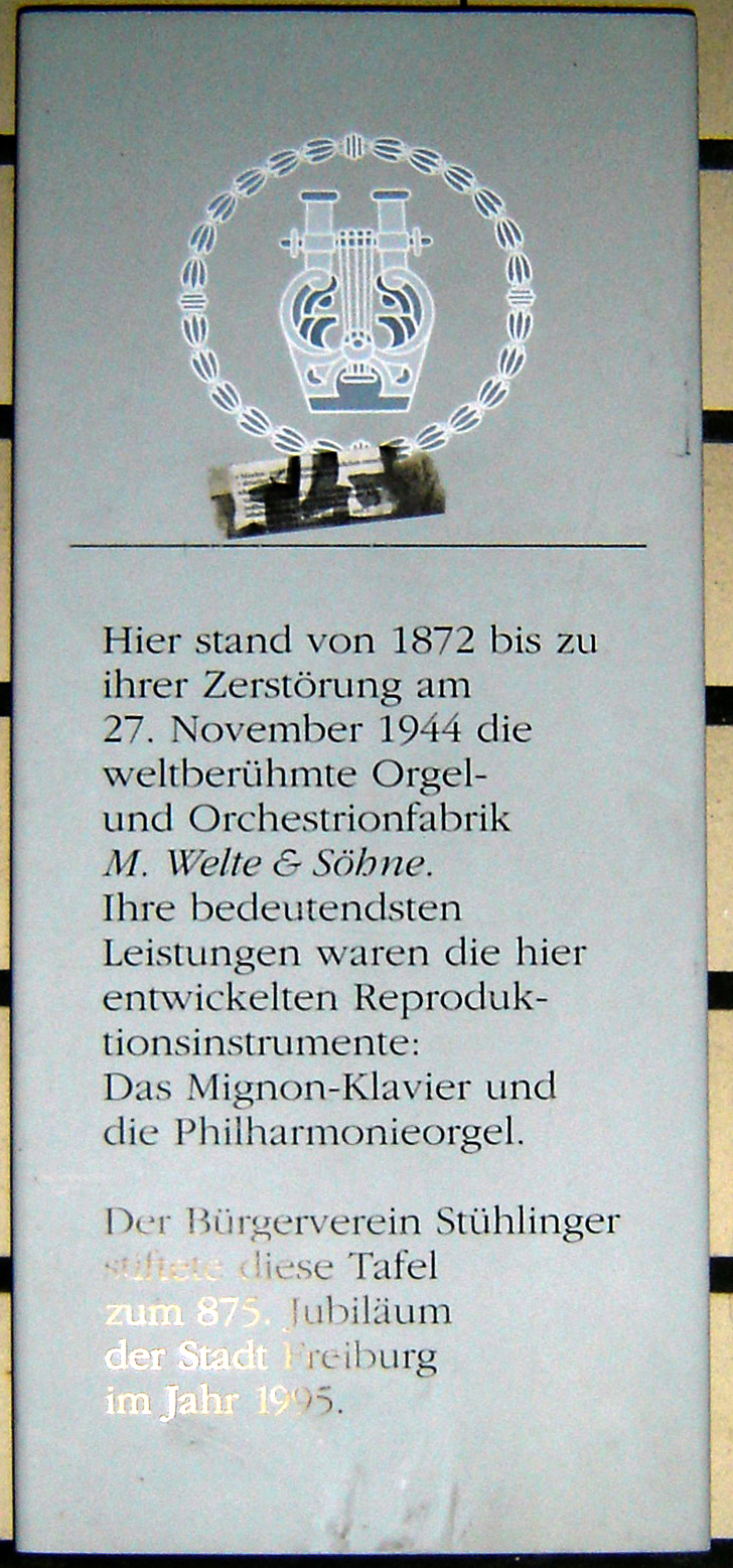 Gedenktafel an die Firma Welte & Söhne am Wohnhaus Lehenerstr. 11 in Freiburg i.Br.